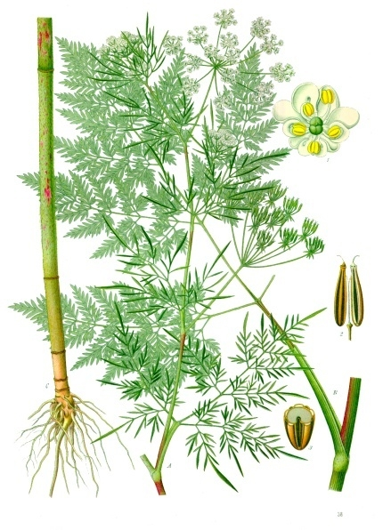 Kerbelrübe. Chaerophyllum bulbosum. A blühender Zweig der Pflanze. B mittleres Stengelblatt. C unterer Teil des Stengels und Wurzel. 1 Blüte; 2 reife Früchte; 3 Frucht im Querschnitt. A, B, C natürliche Grösse, 1, 2, 3 vergrössert.